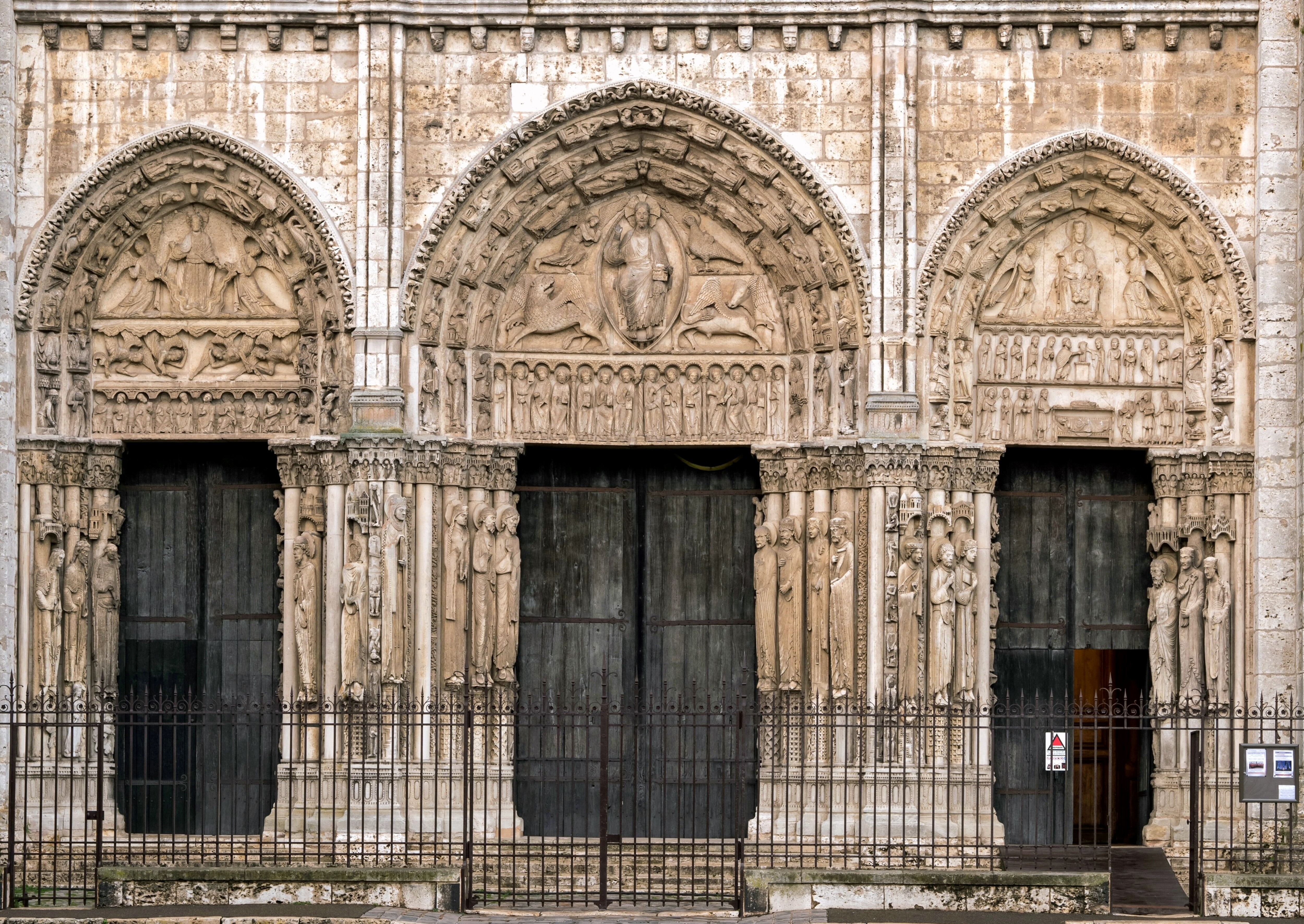 Das dreiteilige Westportal aus der Mitte des 12. Jahrhunderts mit der dreifachen Darstellung Christi in den Tympana: rechts als Kind mit seiner Mutter Maria, links in der Himmelfahrt und in der Mitte als Weltenherrscher.